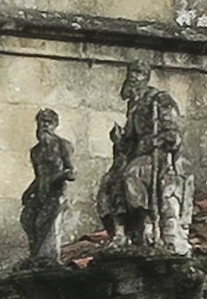 Obras de Hodart, Capela dos Coimbras, Braga